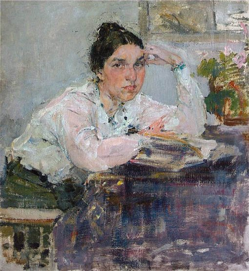 Портрет Н.М. Сапожниковой